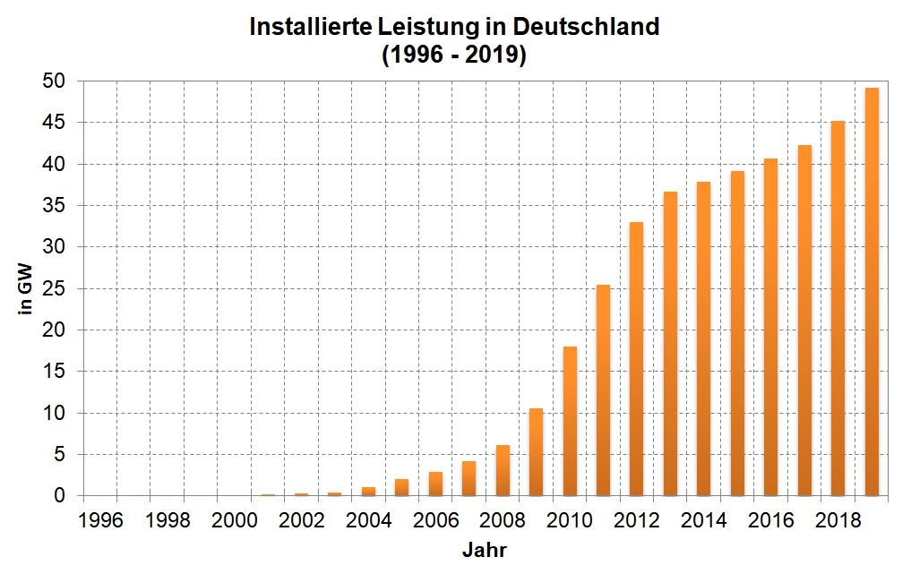 Installierte PV-Leistung in Deutschland (1996-2019) Quellen: AGEE, BMWi, Bundesnetzagentur, Fraunhofer ISE